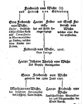 Stammbaum der ostfriesischen Adelsfamilie von Wicht (Ausschnitt).